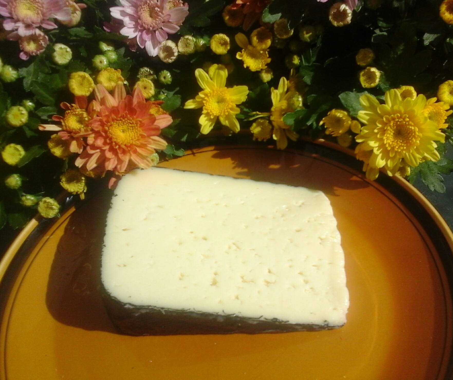 Tranche de tomme des Pyrénées.